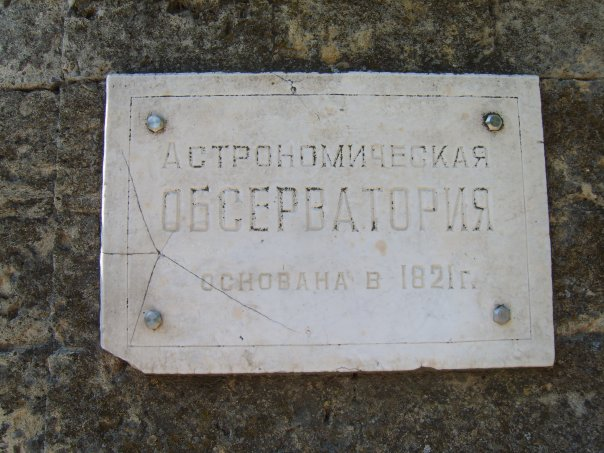 "Астрономическая обсерватория Основана в 1821 г." город Николаев. (Украина)